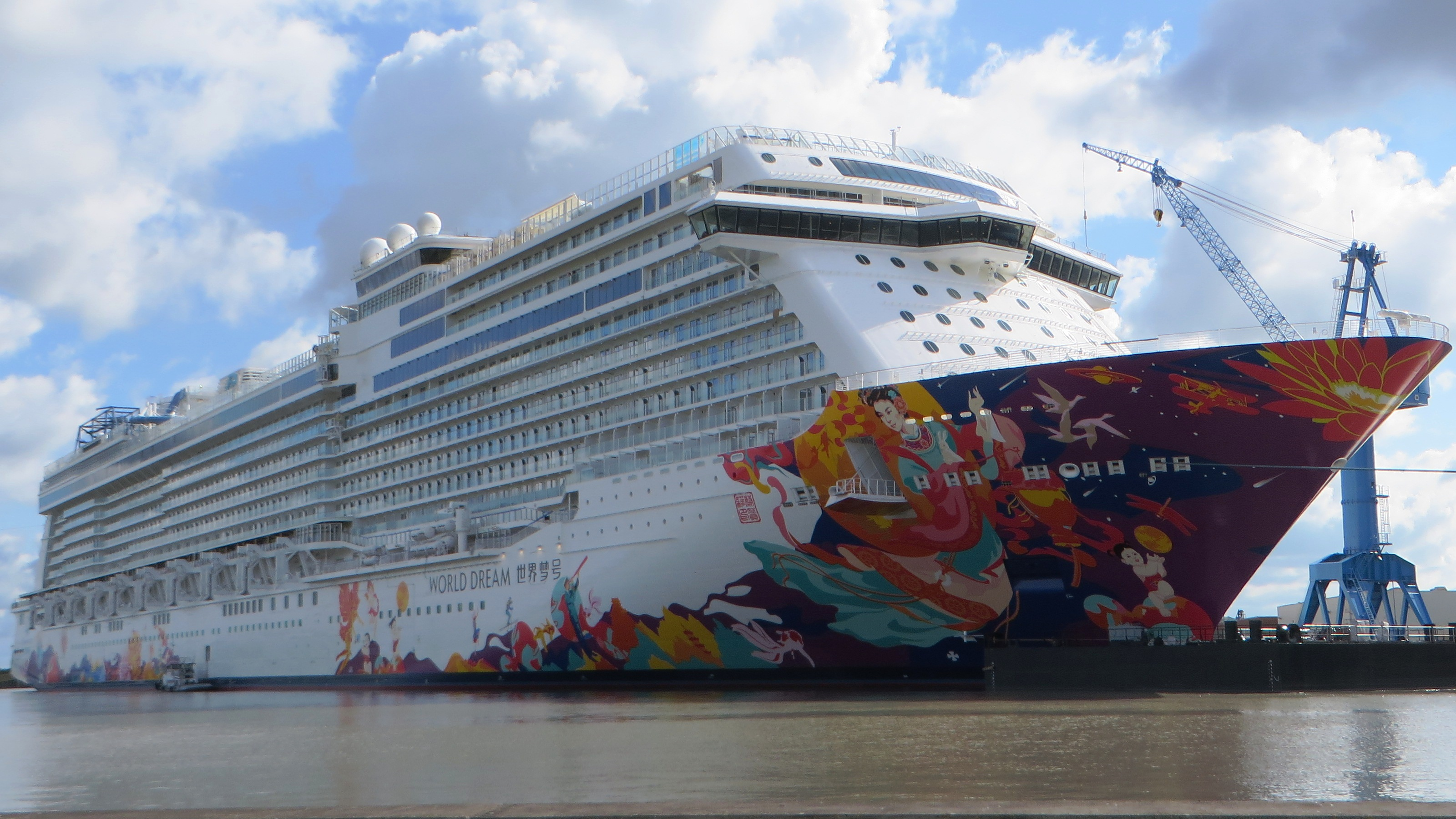 World Dream 2017